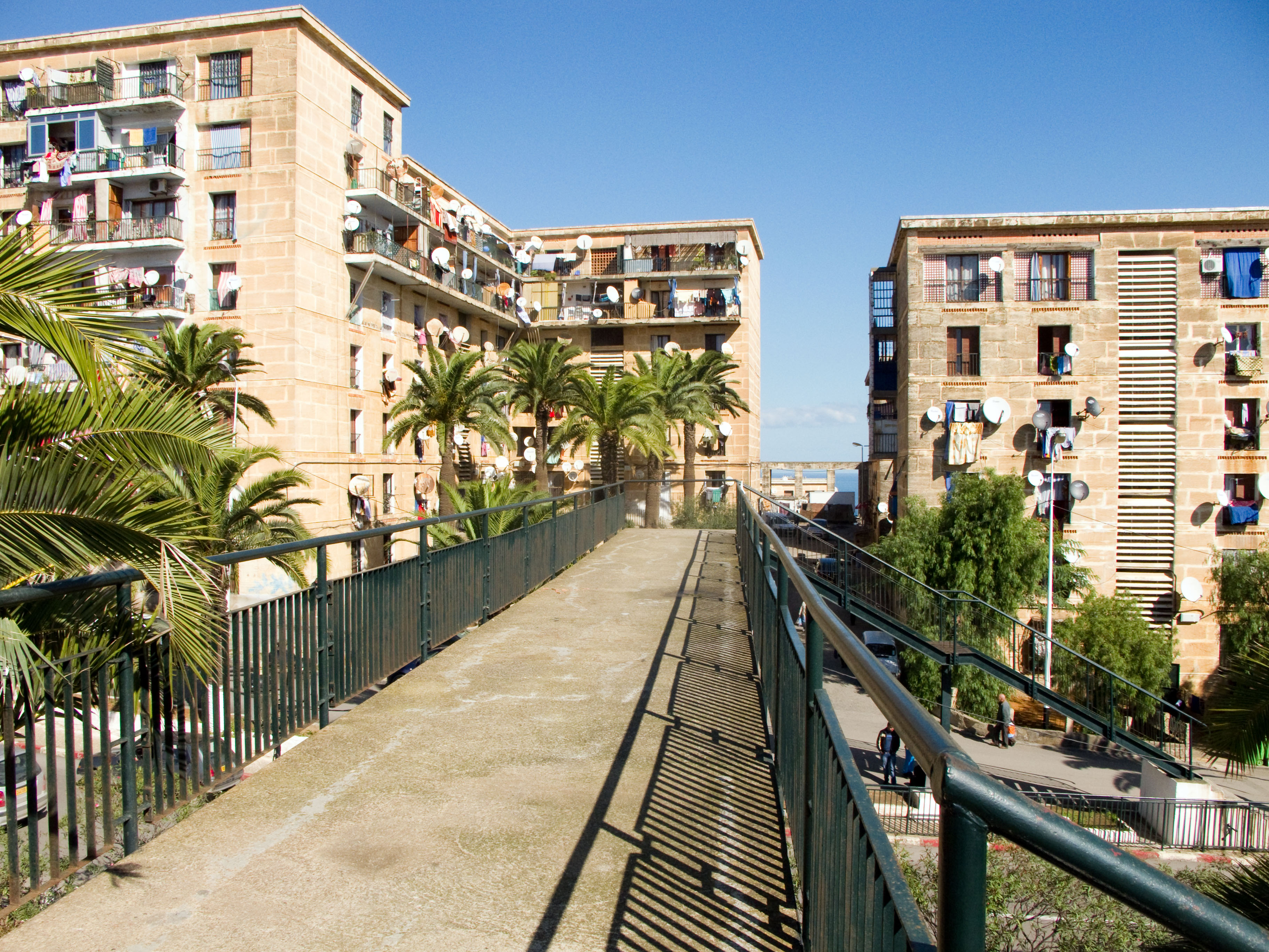 Diar El Mahçoul, Alger, Algérie